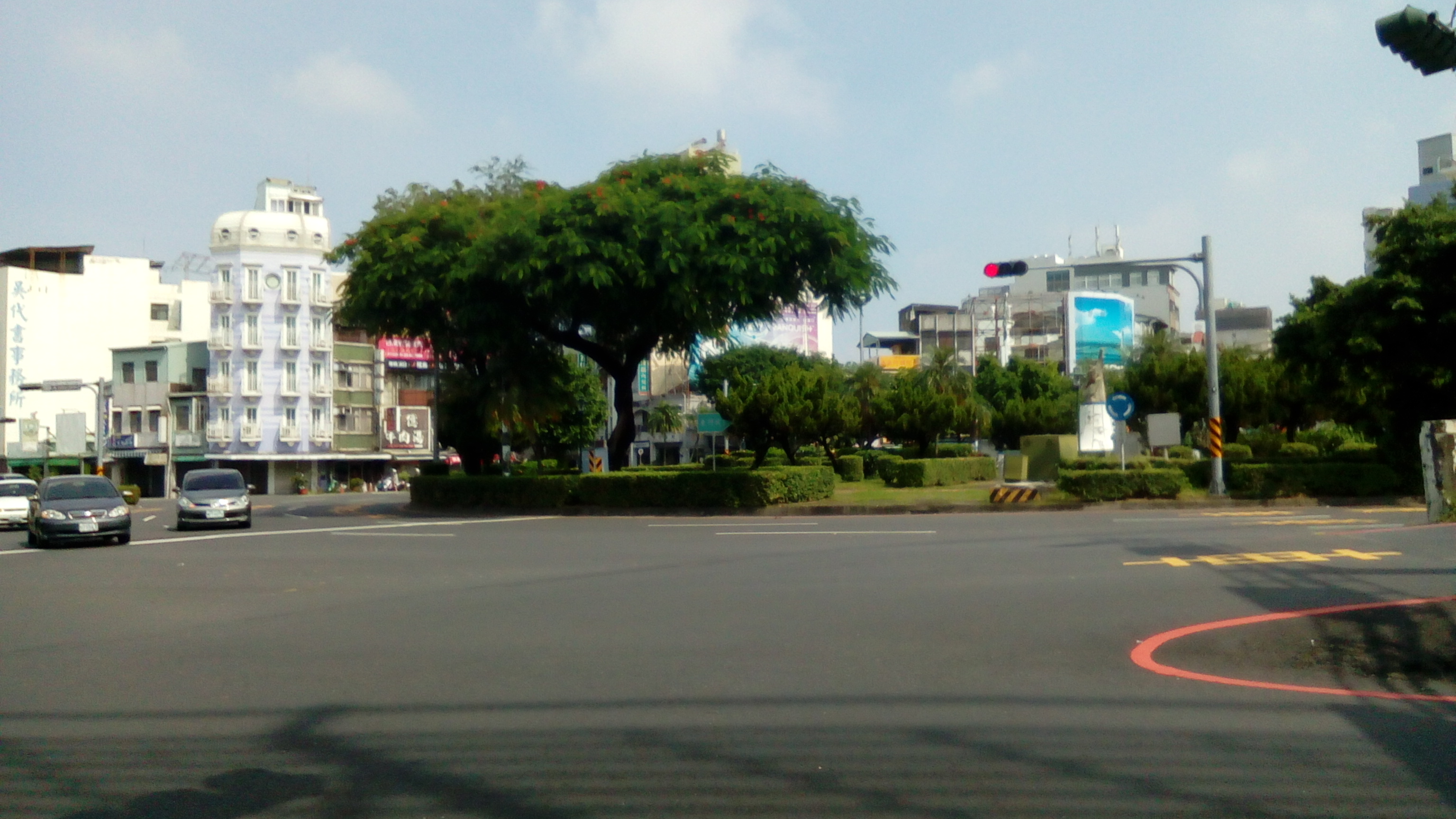 府前路一段與大同路一段口